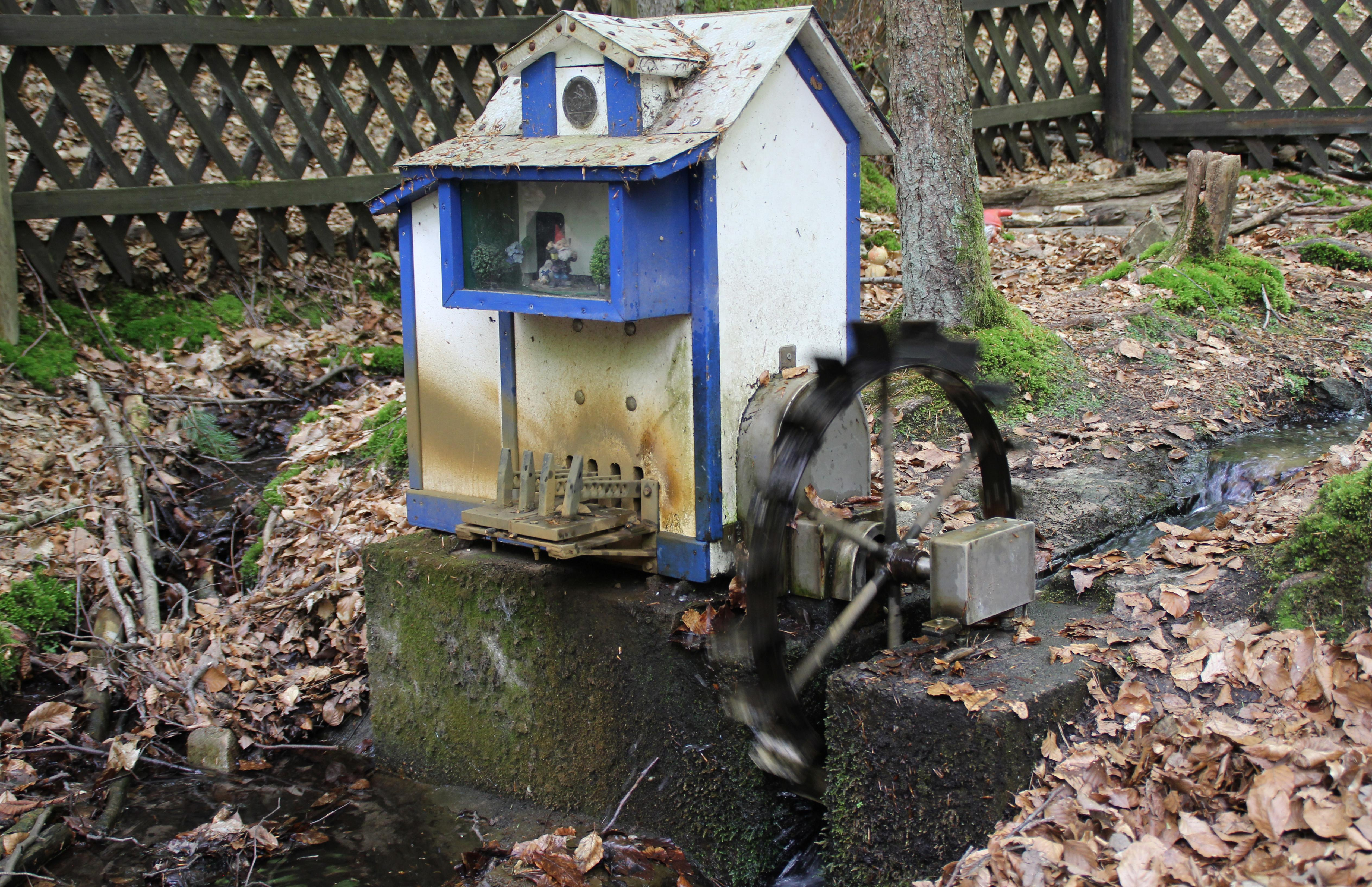 Das Klappermühlchen, betrieben vom Einfallsgraben, bei Alzenau in Unterfranken